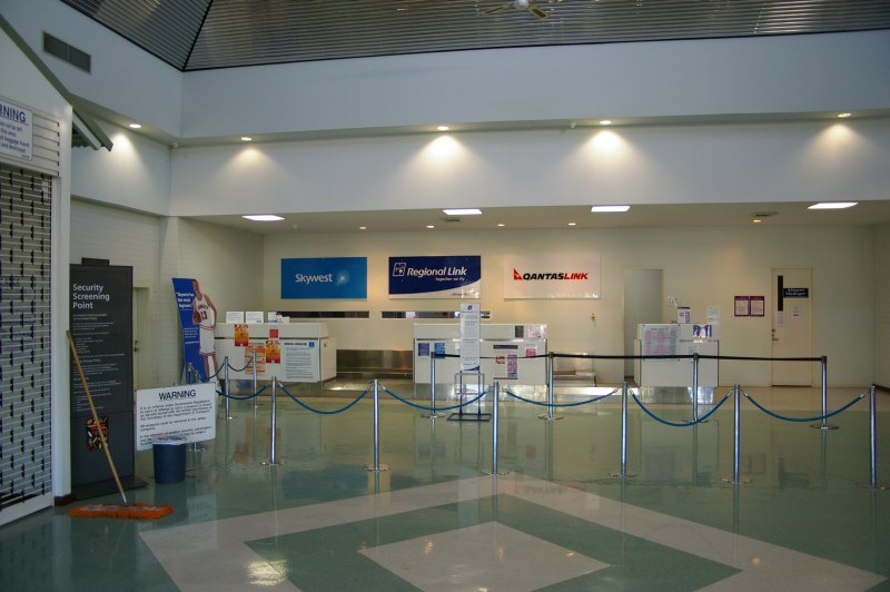 Kununurra Airport. Kununurra, Western Australia